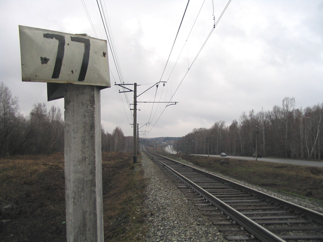 Tomsk rail line, 76/77 km